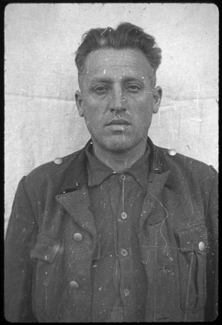 Wilhelm Wagner (* 28. November 1904 in Augsburg; † 29. Mai 1946 in Landsberg am Lech) war ein deutscher SS-Hauptscharführer und als Kommandoführer in den Konzentrationslagern Mauthausen und Dachau (sowohl im Stammlager als auch in mehreren Außenlagern) eingesetzt. Wagner wurde im Dachau-Hauptprozess zum Tode verurteilt und hingerichtet.